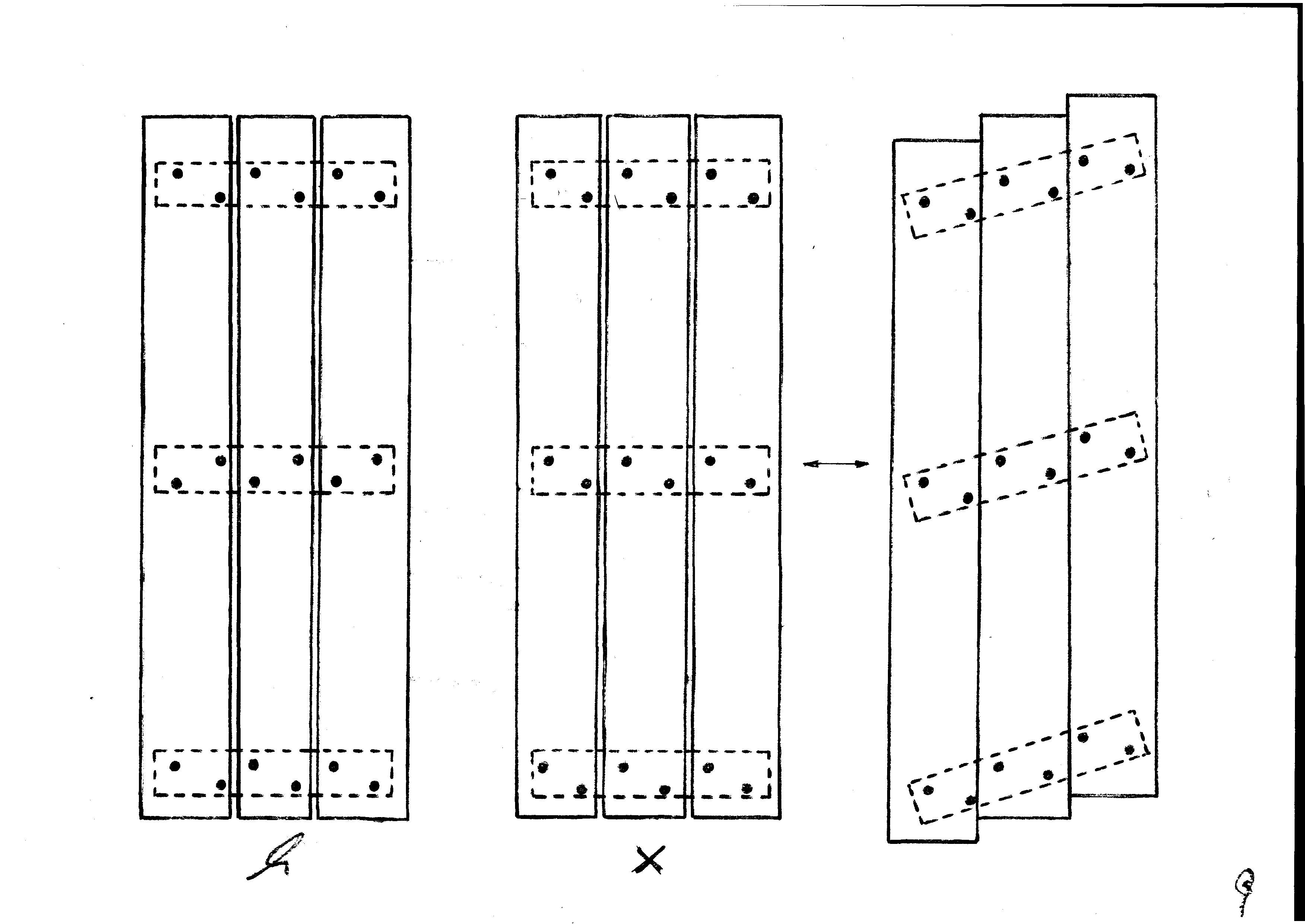 De manier van bevestigen van klampen aan een luik, lijkt erg, maar is theorie. In de praktijk gebeurt dit niet, tenzij de gaten erg uitgelubberd zijn. Dat komt door de twee boutjes naast elkaar. Bij één boutje zou dit wel zo uitwerken.